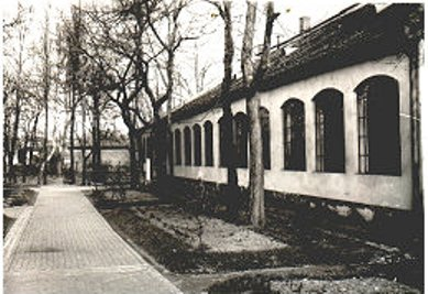 Fehér Ferenc Elektromos Finommechanikai Készülékek Gyára